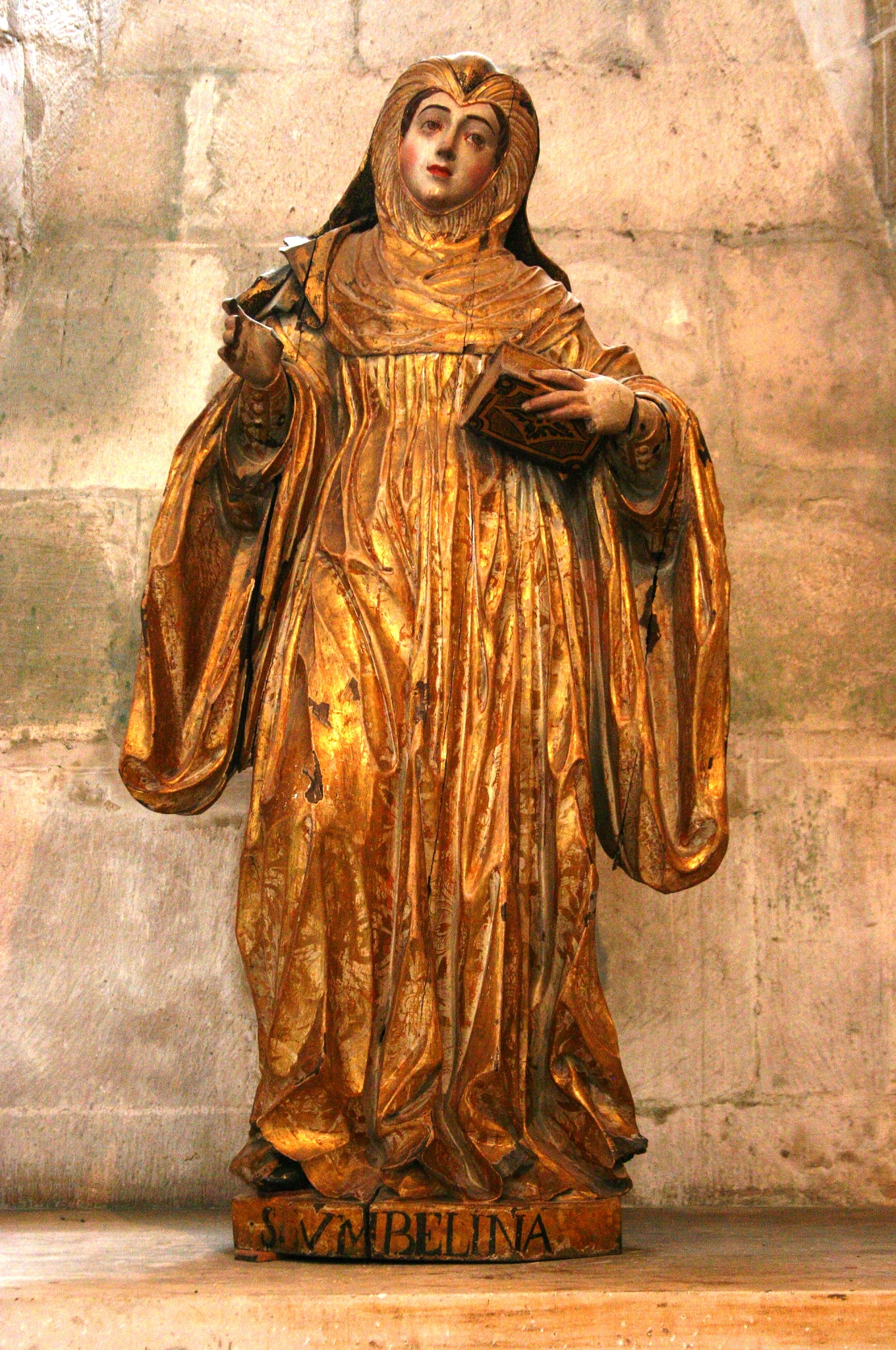 Santa Umbelina